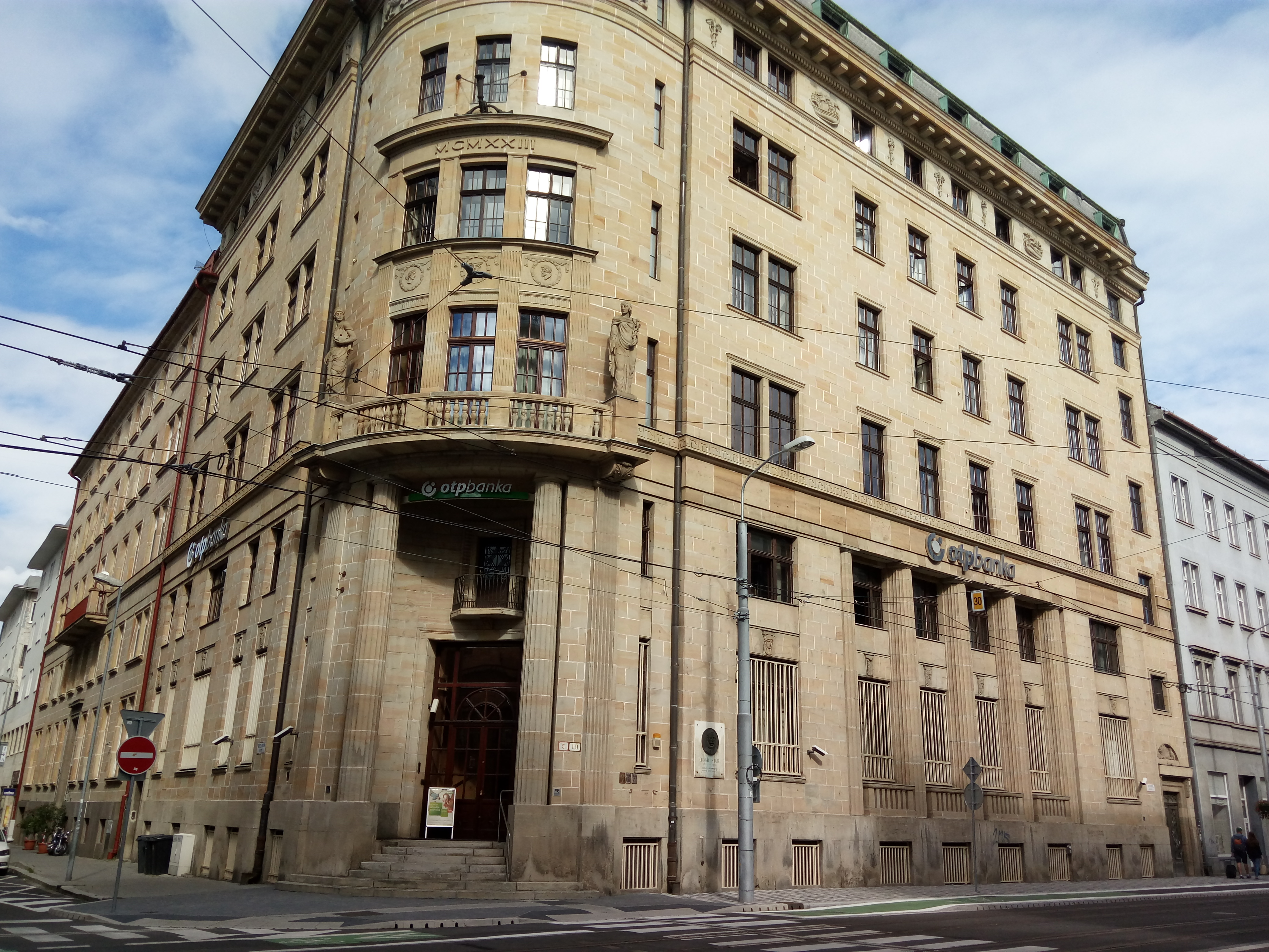 Štúrova, Staré Mesto, Bratislava